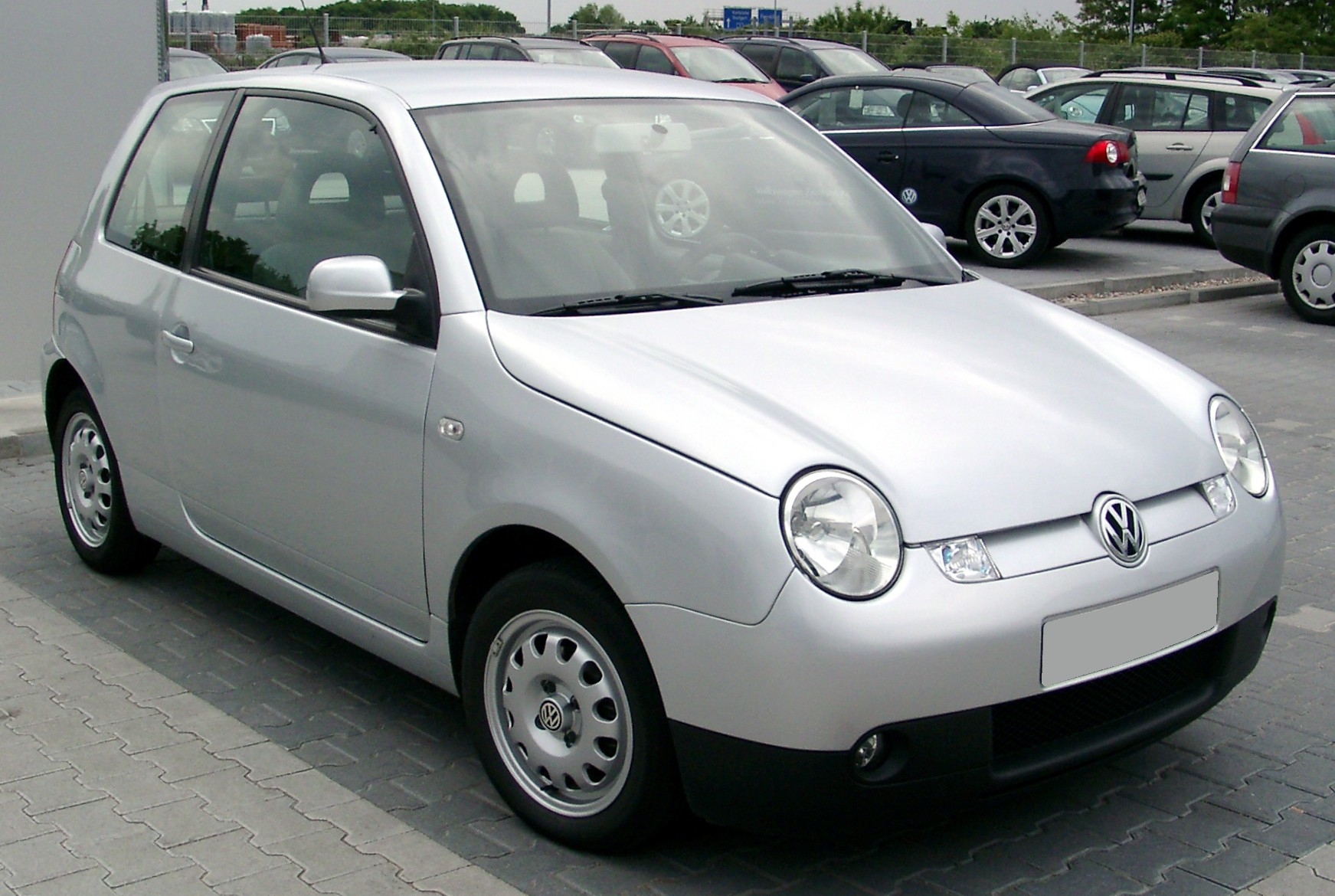 VW Lupo